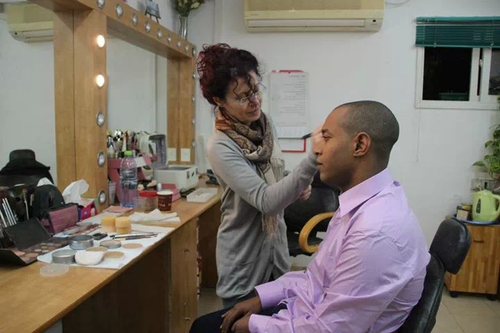 מתאפר לתוכנית טלויזיה .